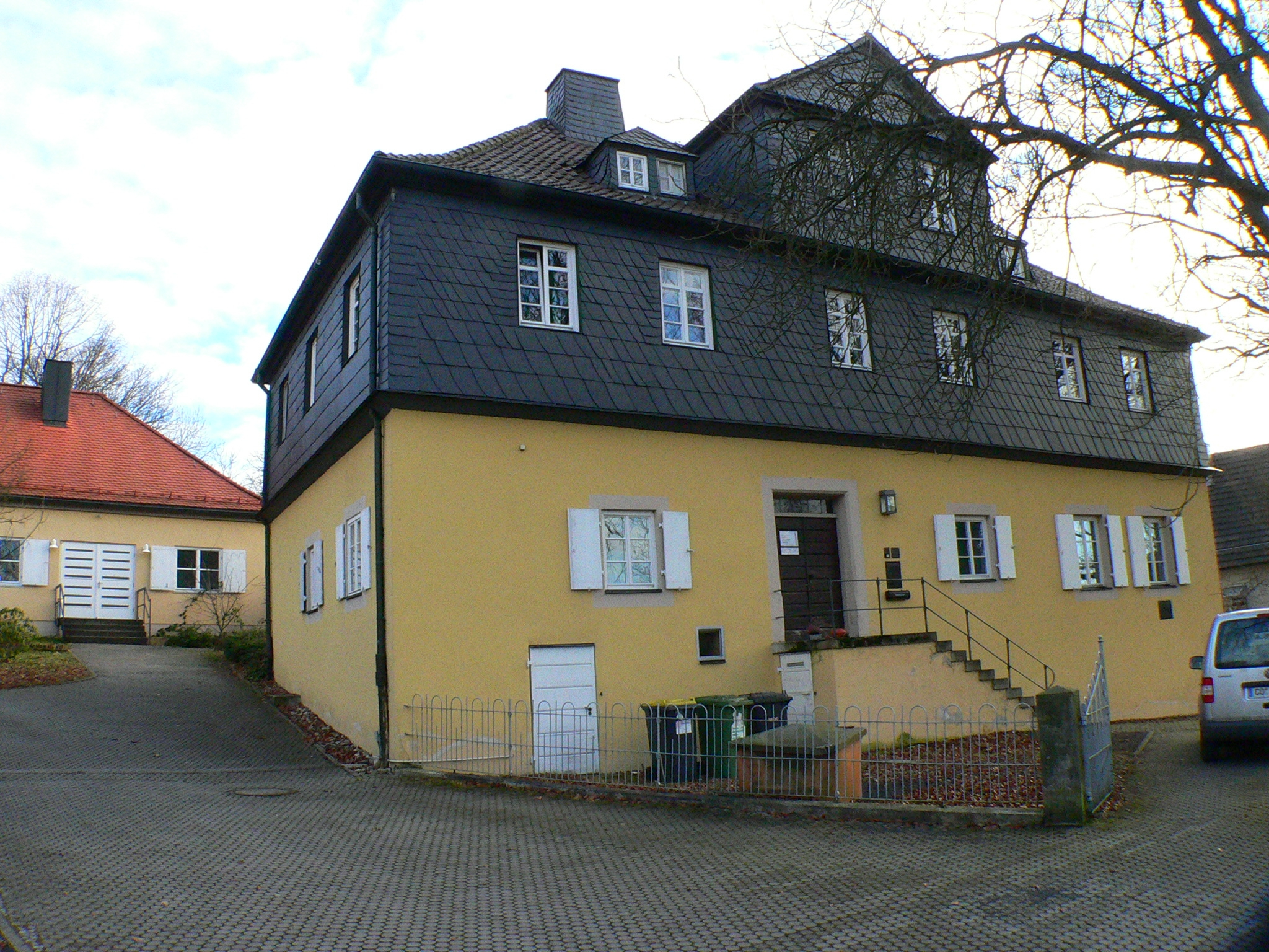 Coburg Stadtteil Scheuerfeld, Nicolaus-Zech-Straße 20 - Pfarrhaus, ehemaliges Schloss der Merklins